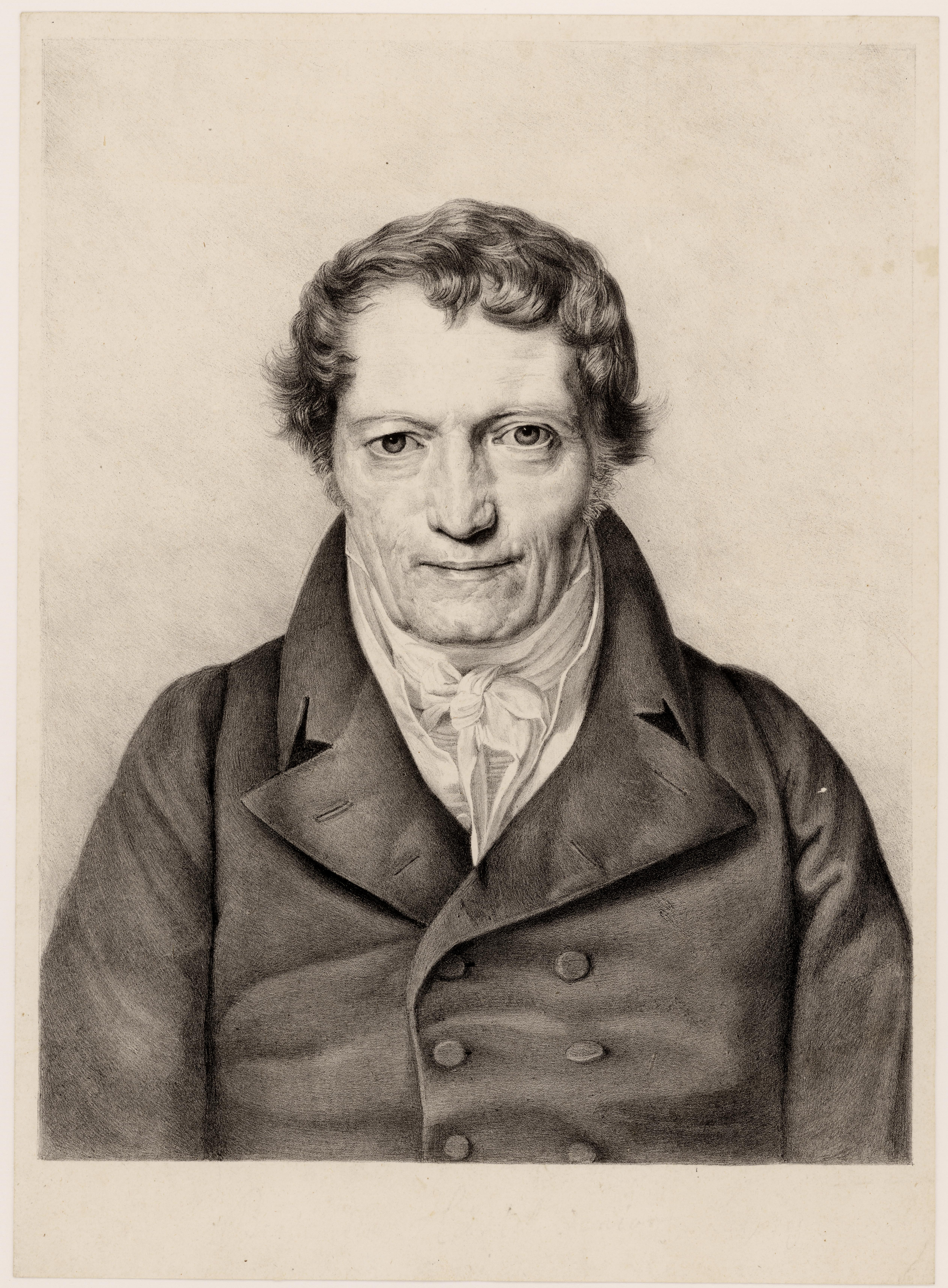 Porträt Gottfried Christoph Härtel (1763–1827) Brustbild von vorn vor schlichtem Hintergrund im Rechteck.